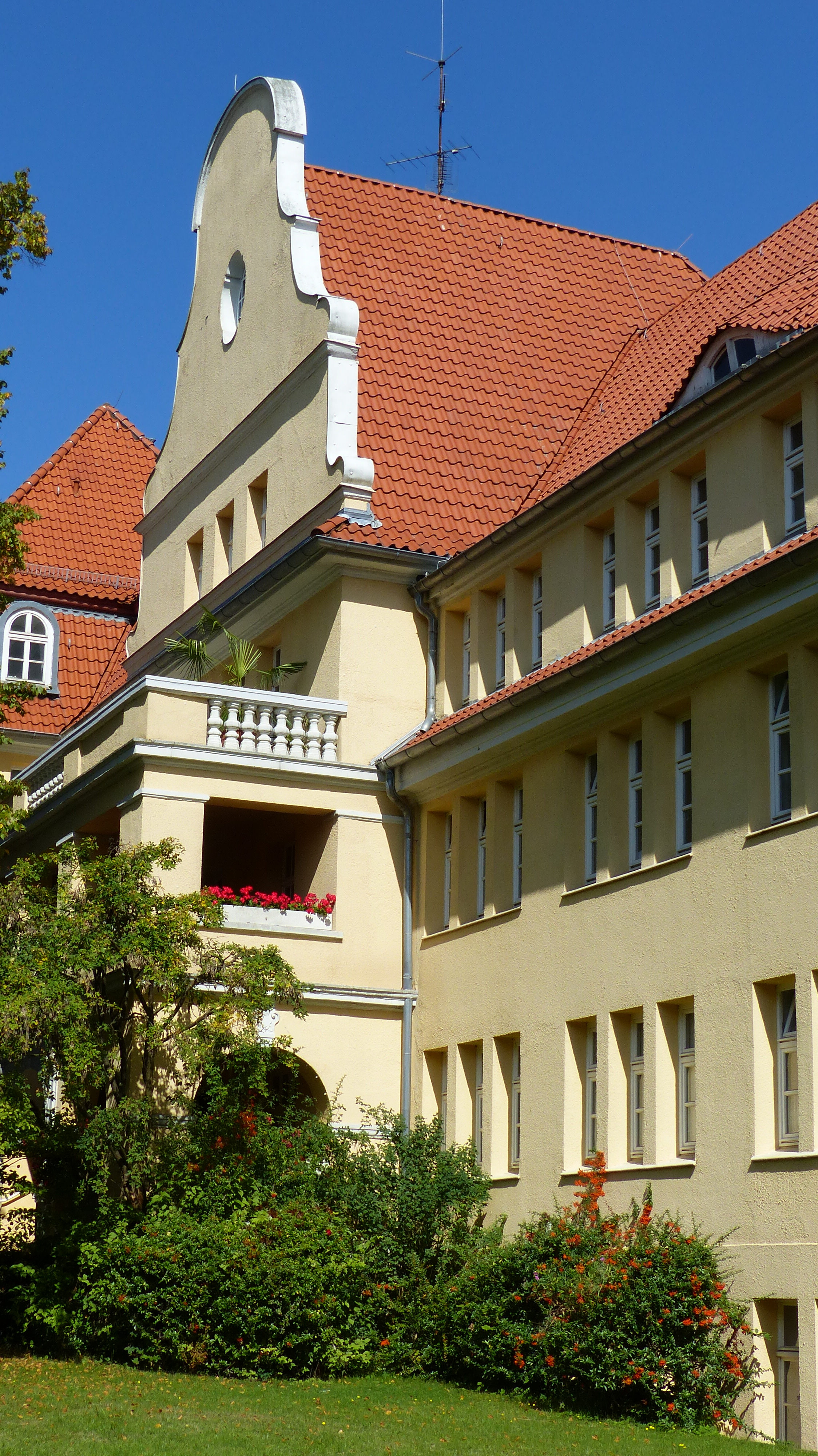 Kieler Stadtkloster, Kiel, Harmsstraße 104 - 122